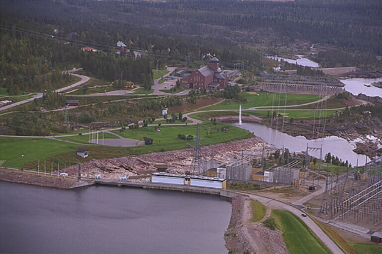 Motiv: Porjus - kraftstation och samhälle Nyckelord: Flygbilder, Riksintressen Kategori: Kraftverk Porjus - kraftstation och samhälle